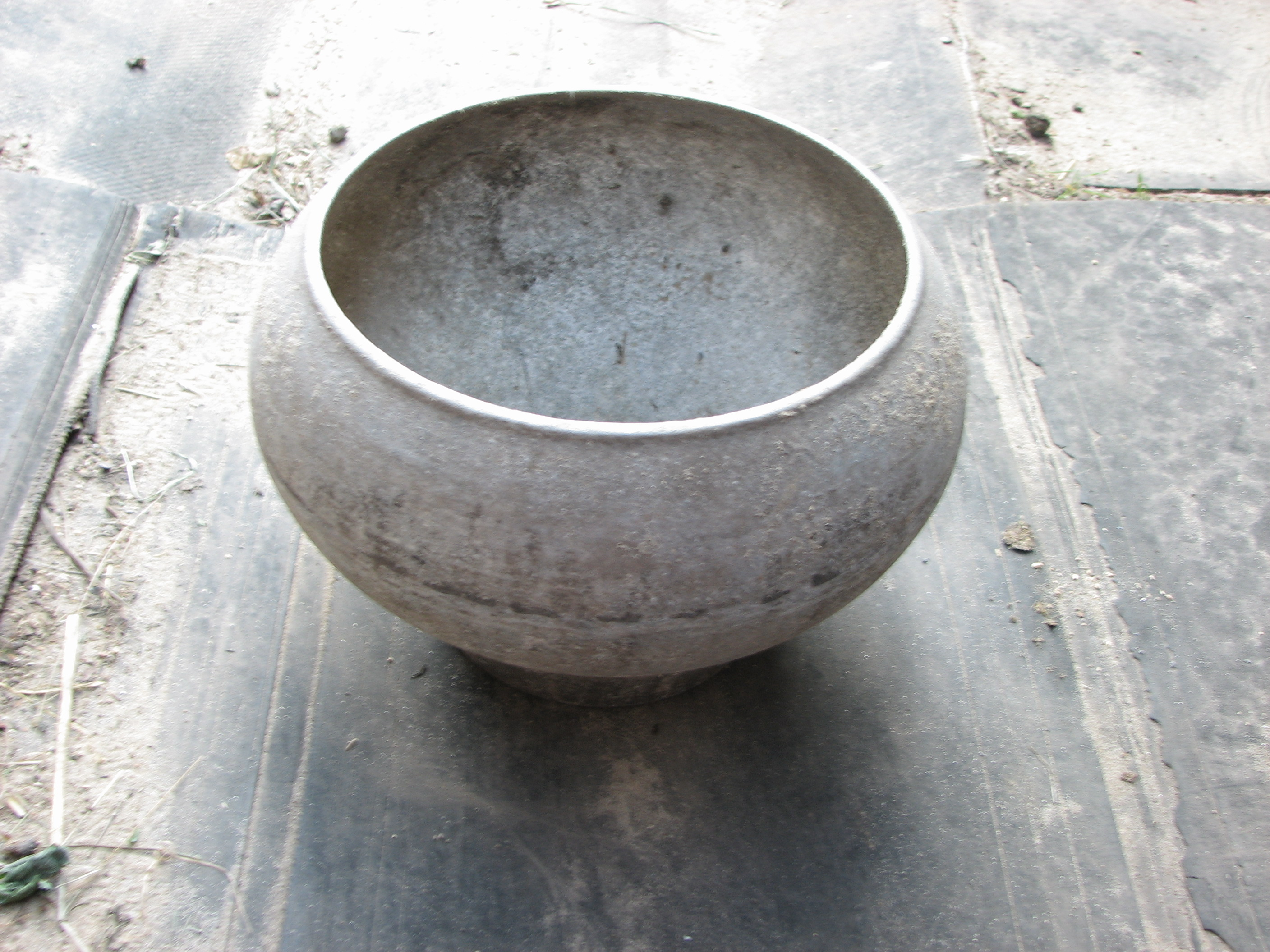 Чугунок